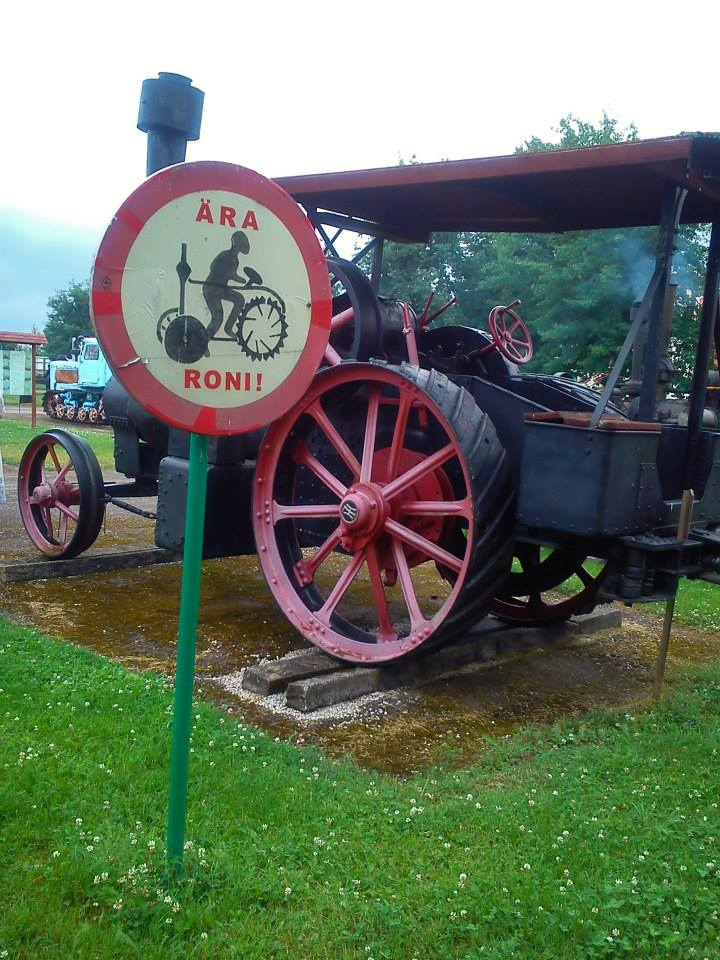 Muzeum Rolnictwa/Eesti Põllumajandusmuuseum, Estonia